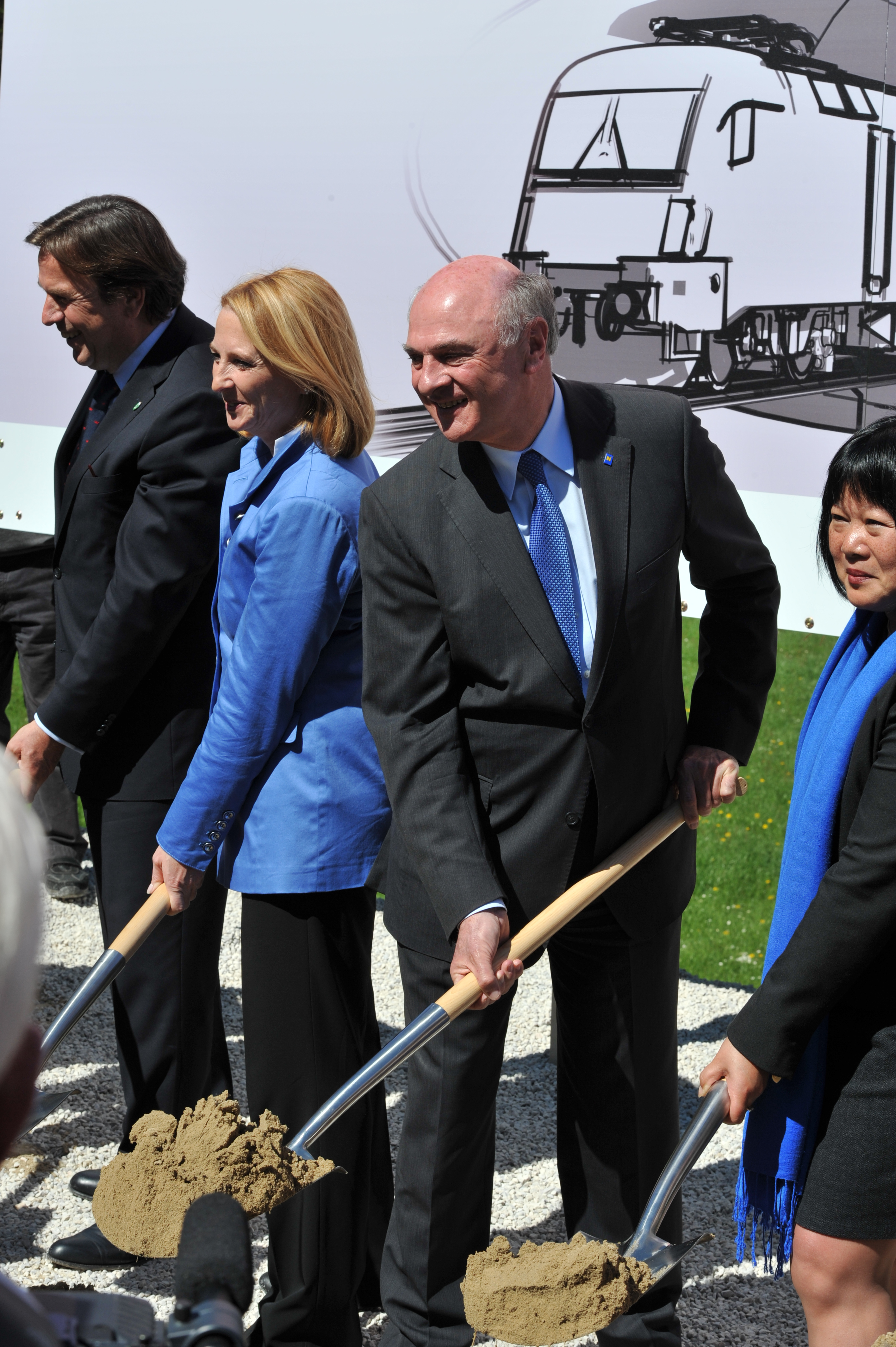 Spatenstich (von links: Franz Voves, Doris Bures, Erwin Pröll, Desiree Oen) des Semmering-Basistunnels in Gloggnitz am 25. April 2012. The making of this work was supported by Wikimedia Austria. For other files made with the support of Wikimedia Austria, please see the category Supported by Wikimedia Österreich.